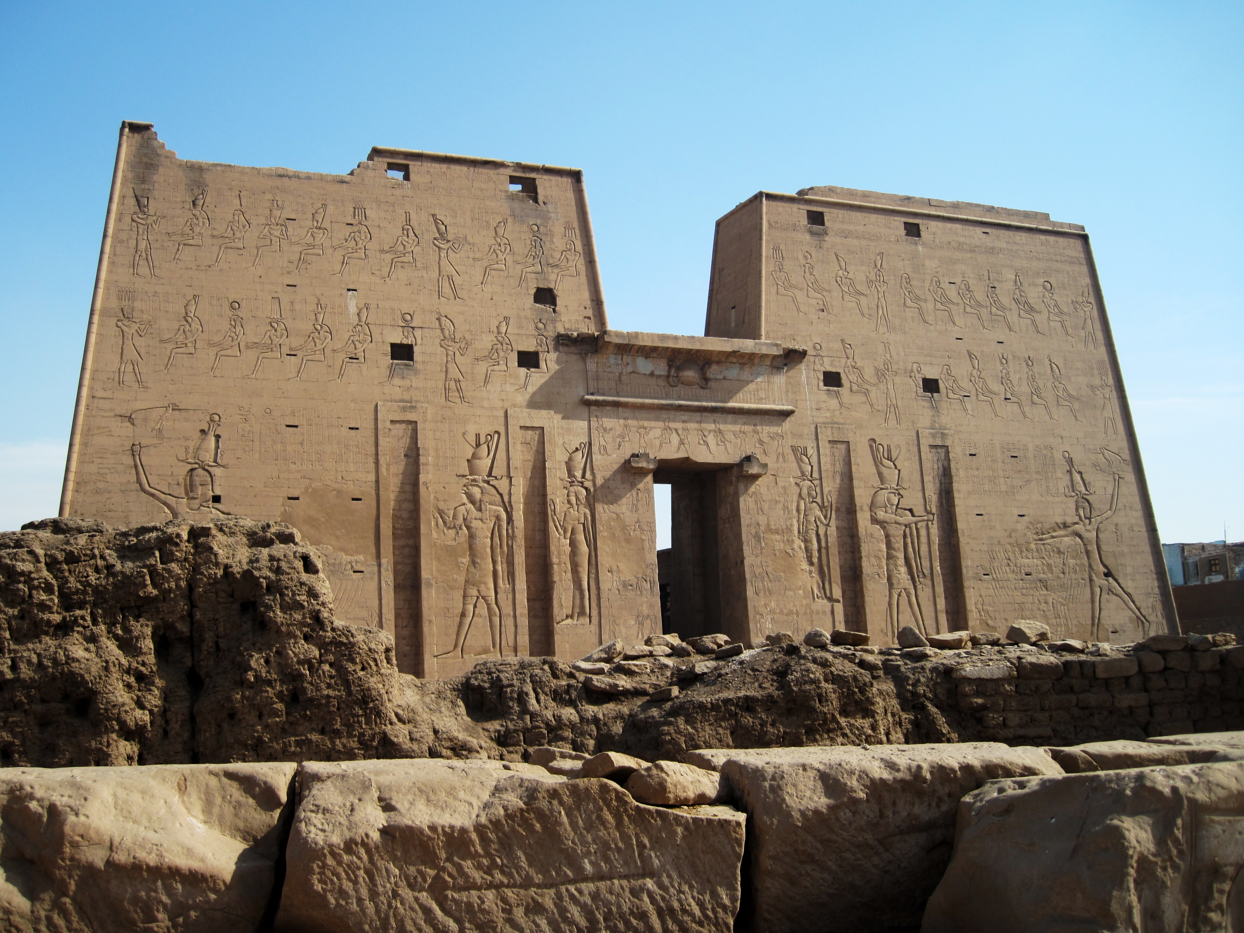 Tempel von Edfu, Ägypten